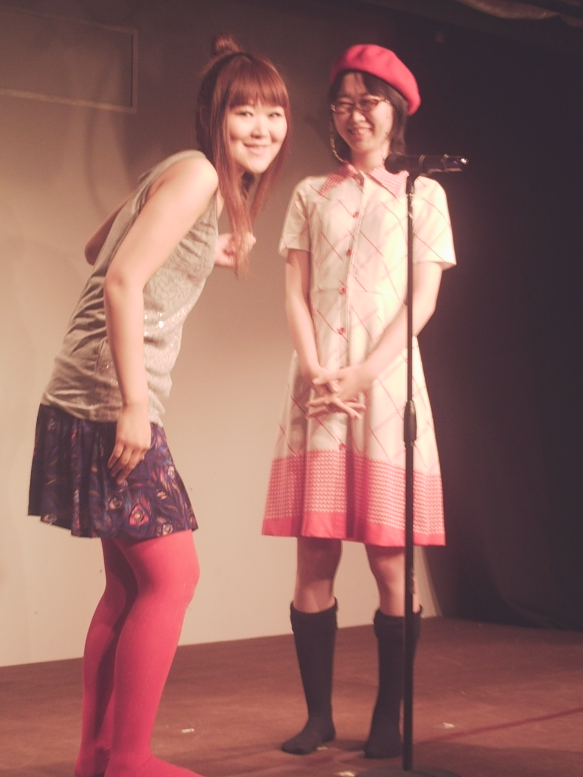 連戦姉妹 (2009年8月)